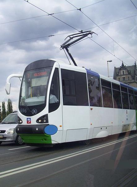 Moderus Alfa w Szczecinie